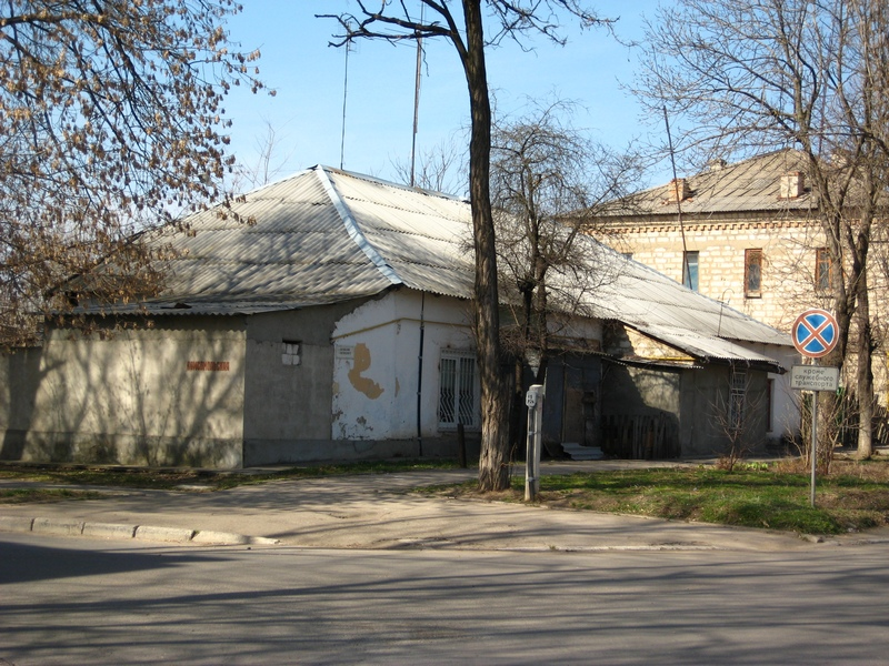 Здание Талмуд-Торы